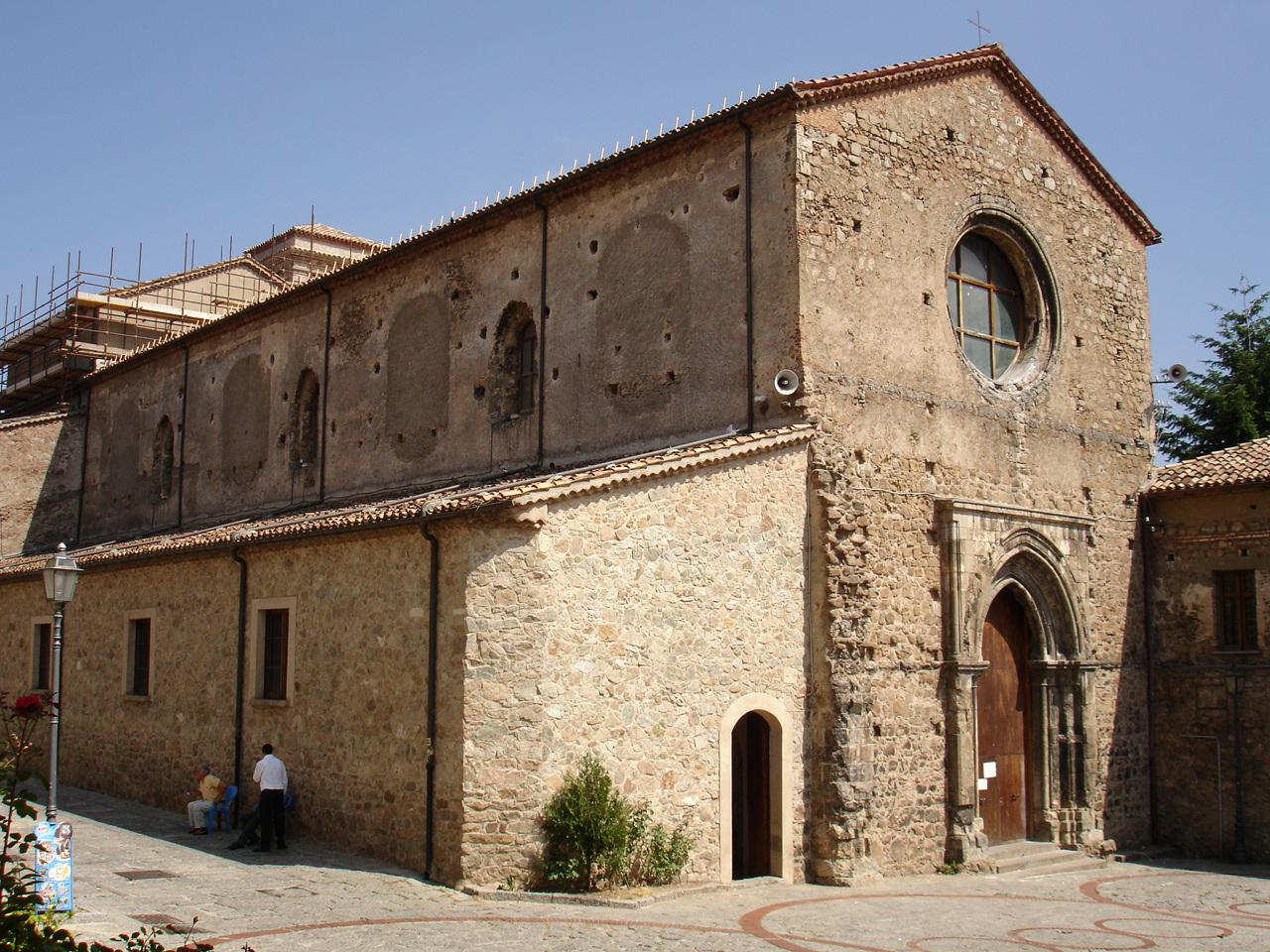 Facciata abbazia e ingresso